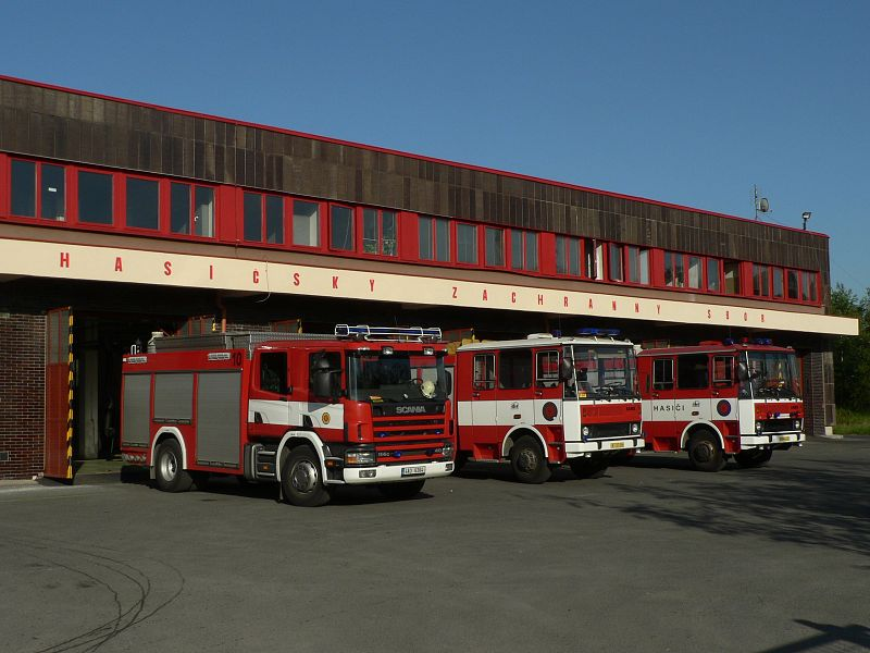 Hasičský záchranný sbor, Praha Malešice